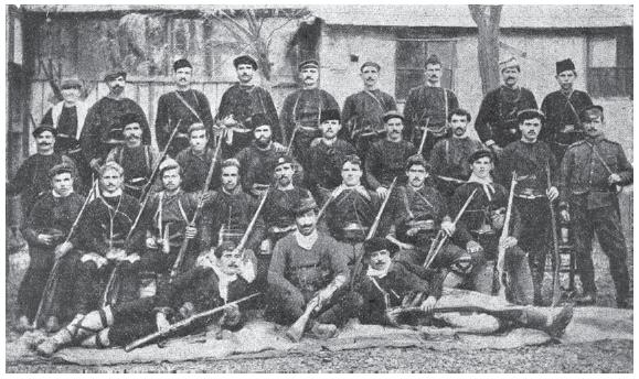 Четата на Димитър Думбалаков.